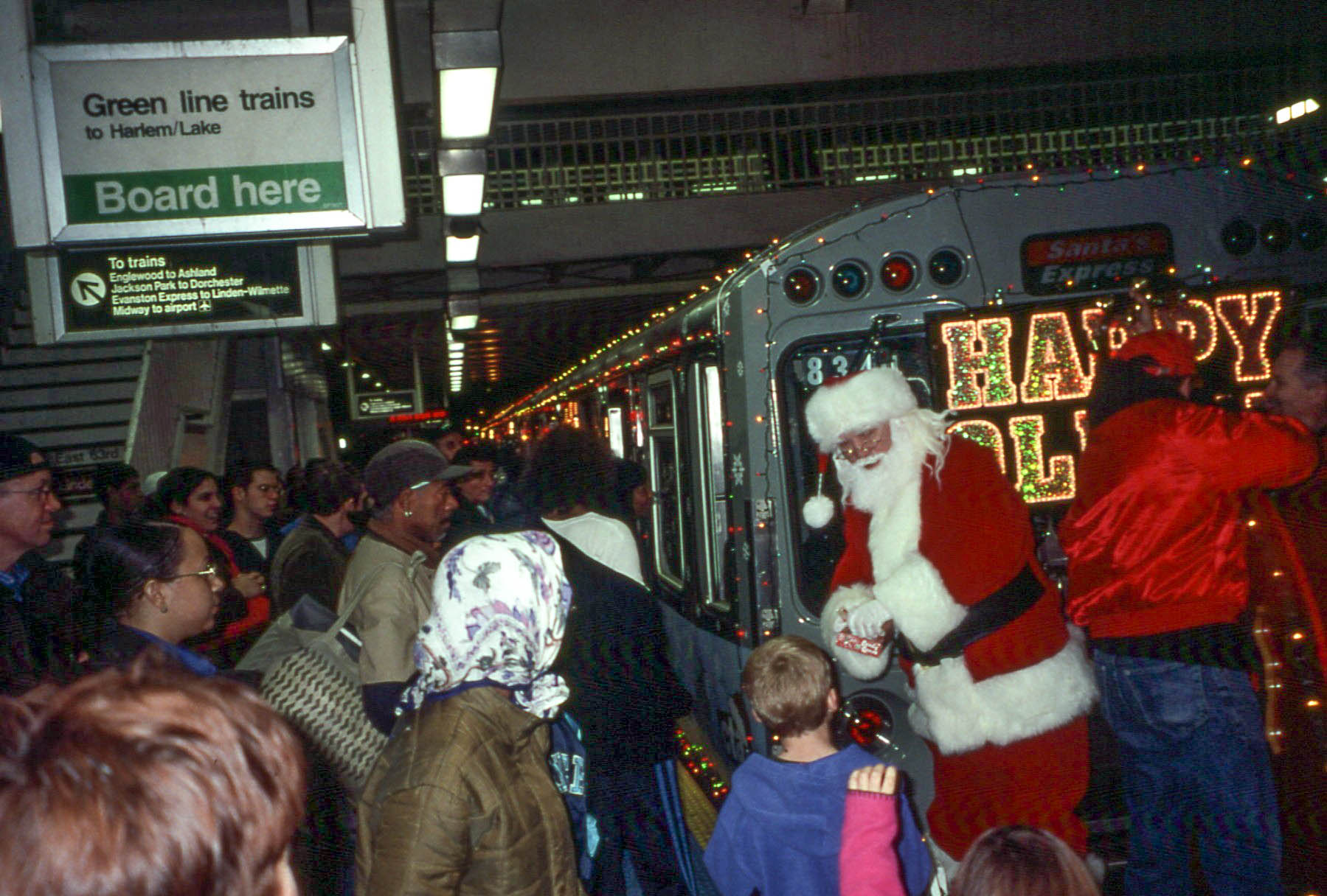 20011123 21 CTA Santa Claus Train